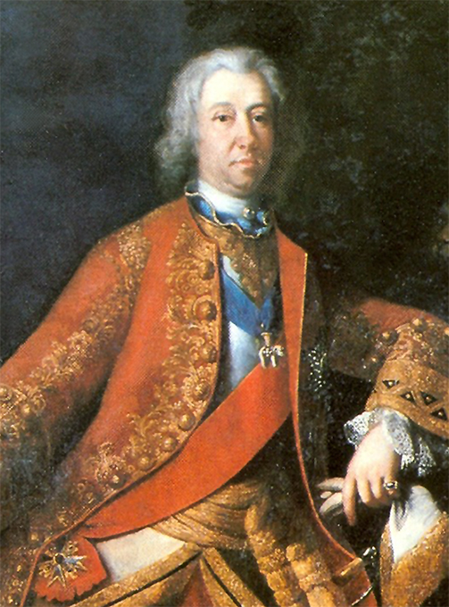 Herzog Eberhard Ludwig von Württemberg (1693-1733), Kaiserlicher General der Kavallerie, seit 09. 07. 1703 Reichsgeneral der Kavallerie, seit 09. 09. 1712 (ev.) Reichsgeneralfeldmarschall